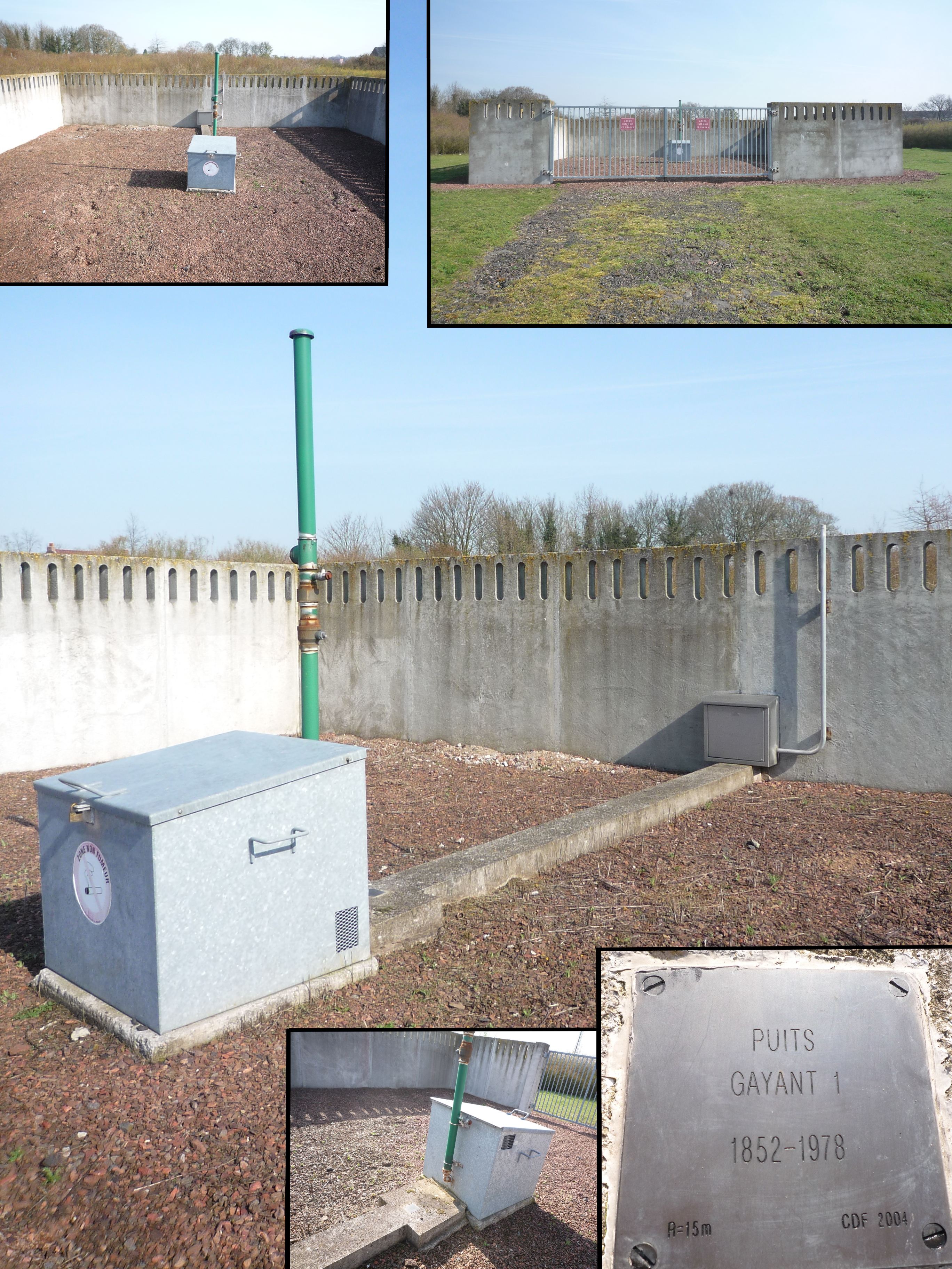 La Fosse Gayant de la Compagnie des mines d'Aniche était un charbonnage constitué de deux puits situé à Waziers, Nord, Nord-Pas-de-Calais, France.